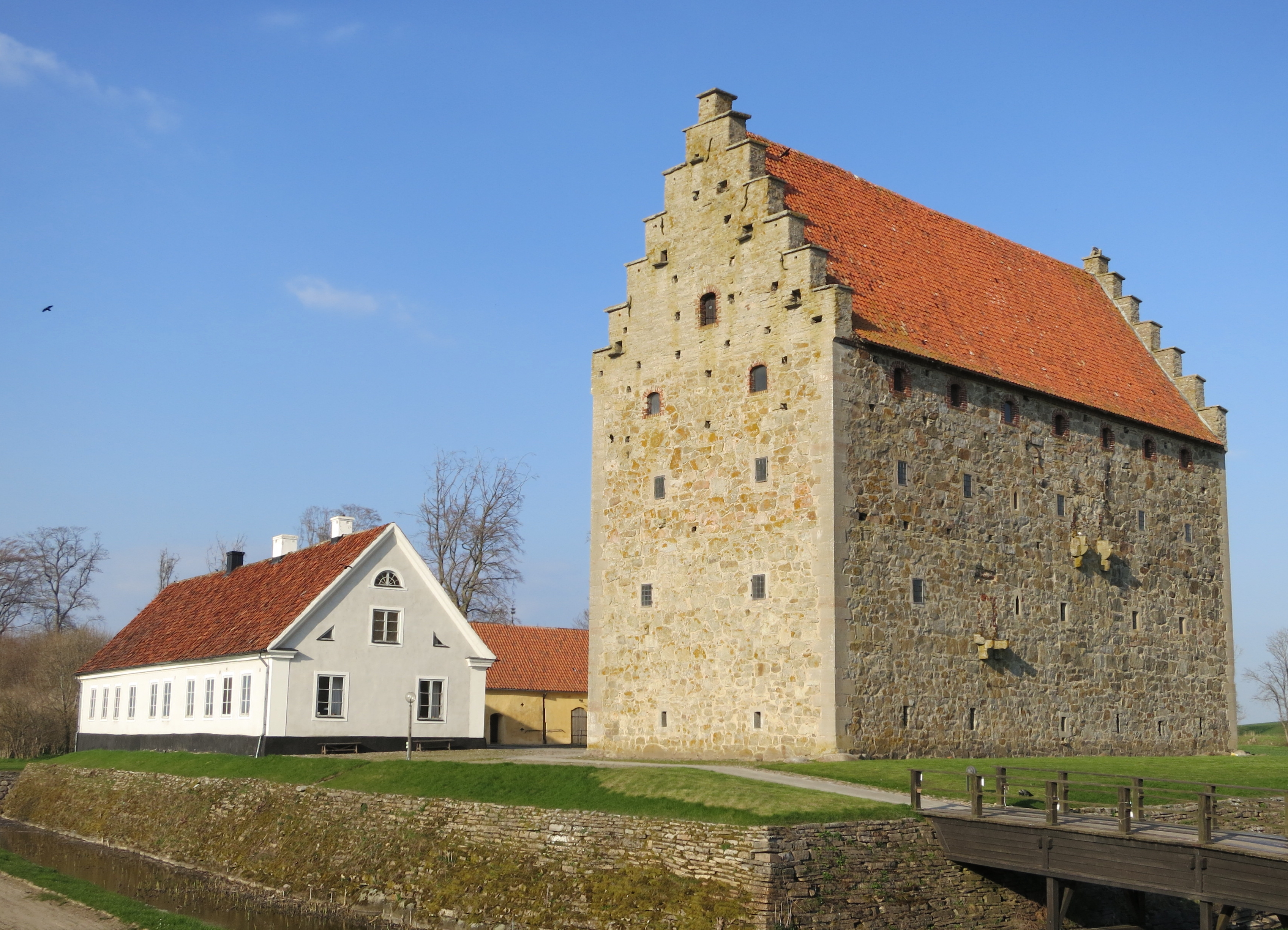 Glimmingehus 2013